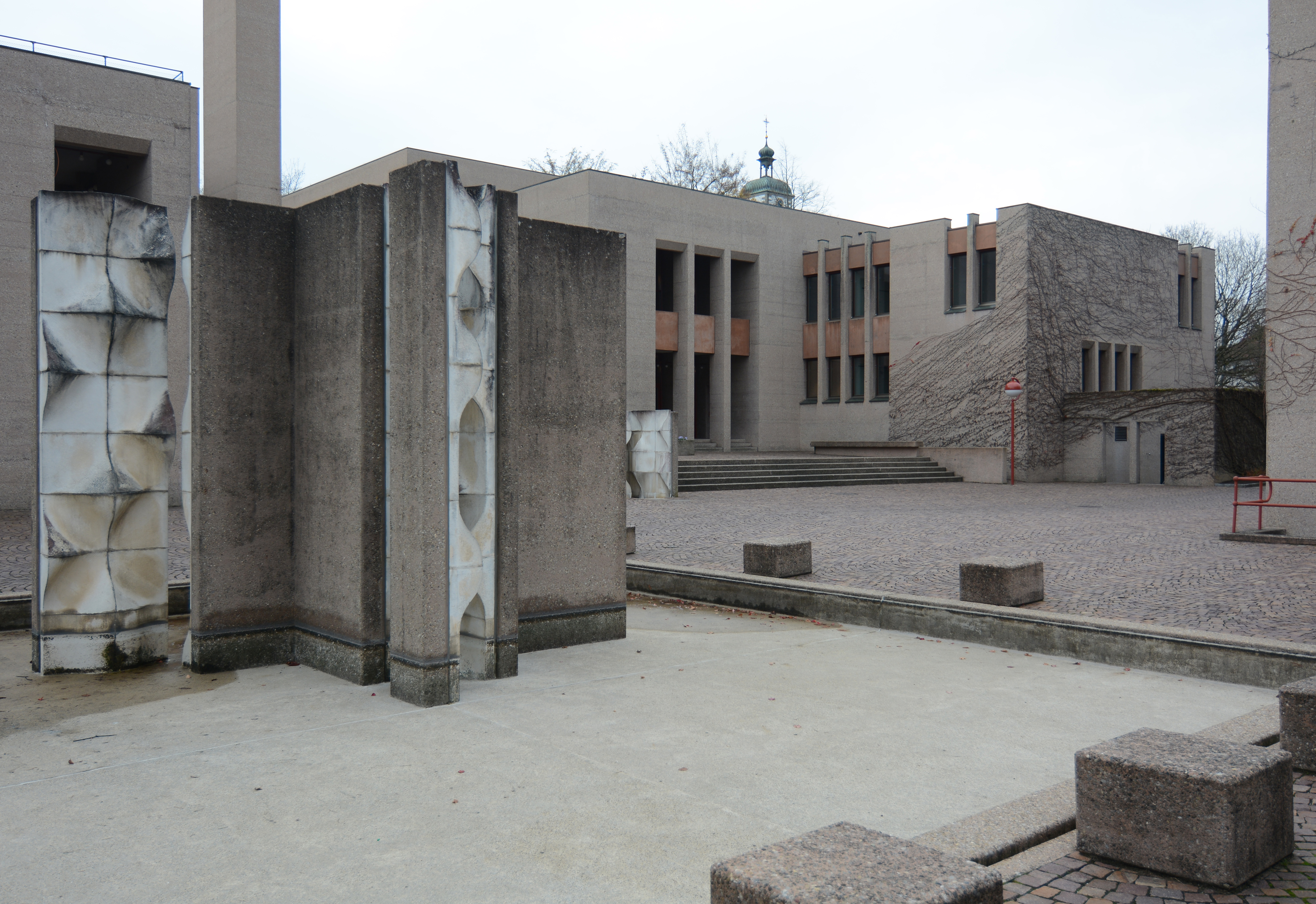 Kantonales Lehrerseminar Kreuzlingen (heute Pädagogische Maturitätsschule Kreuzlingen), Kreuzlingen, 1965–72. Schulplatz. Brunnenskulpturen: Bernard Schorderet. Architekten: Rudolf und Esther Guyer